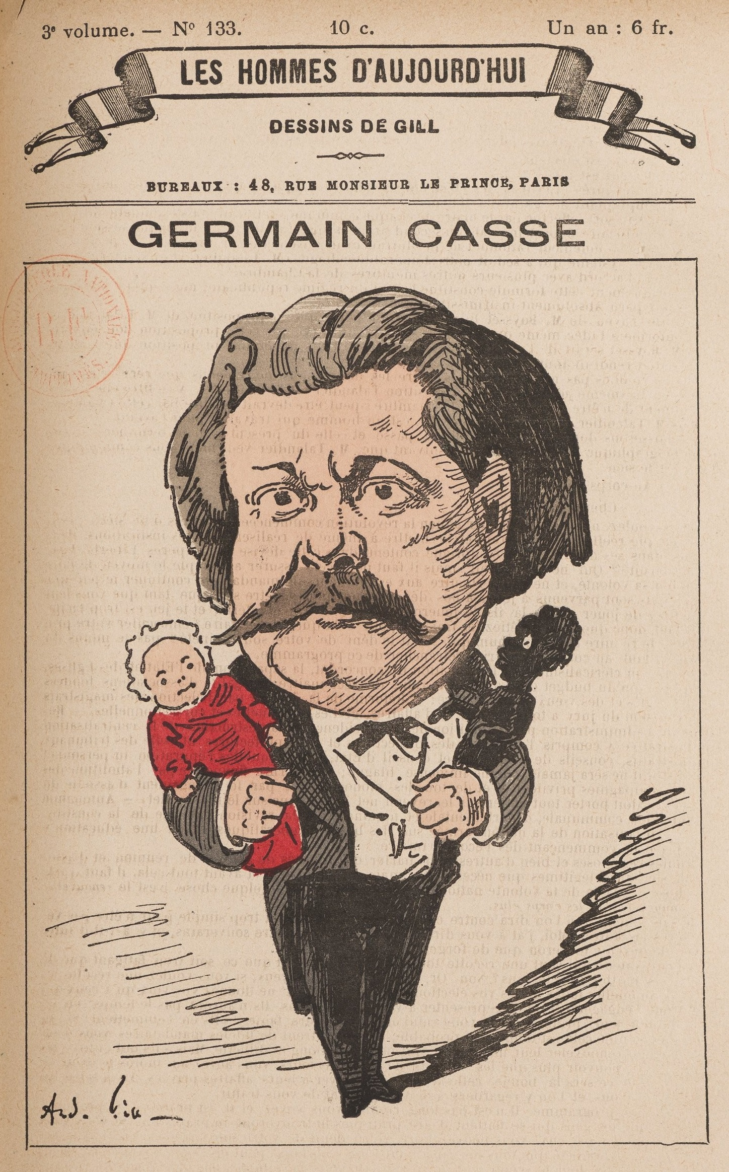 Germain Casse.